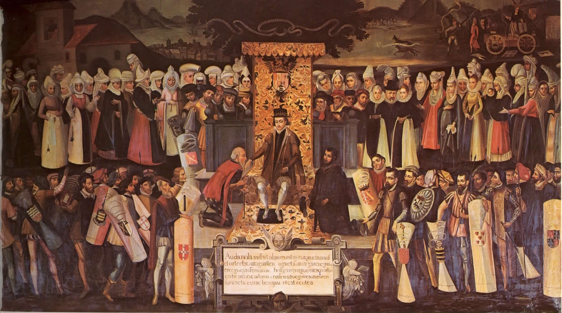 Basque: Fernando katolikoak foruak zin egiten